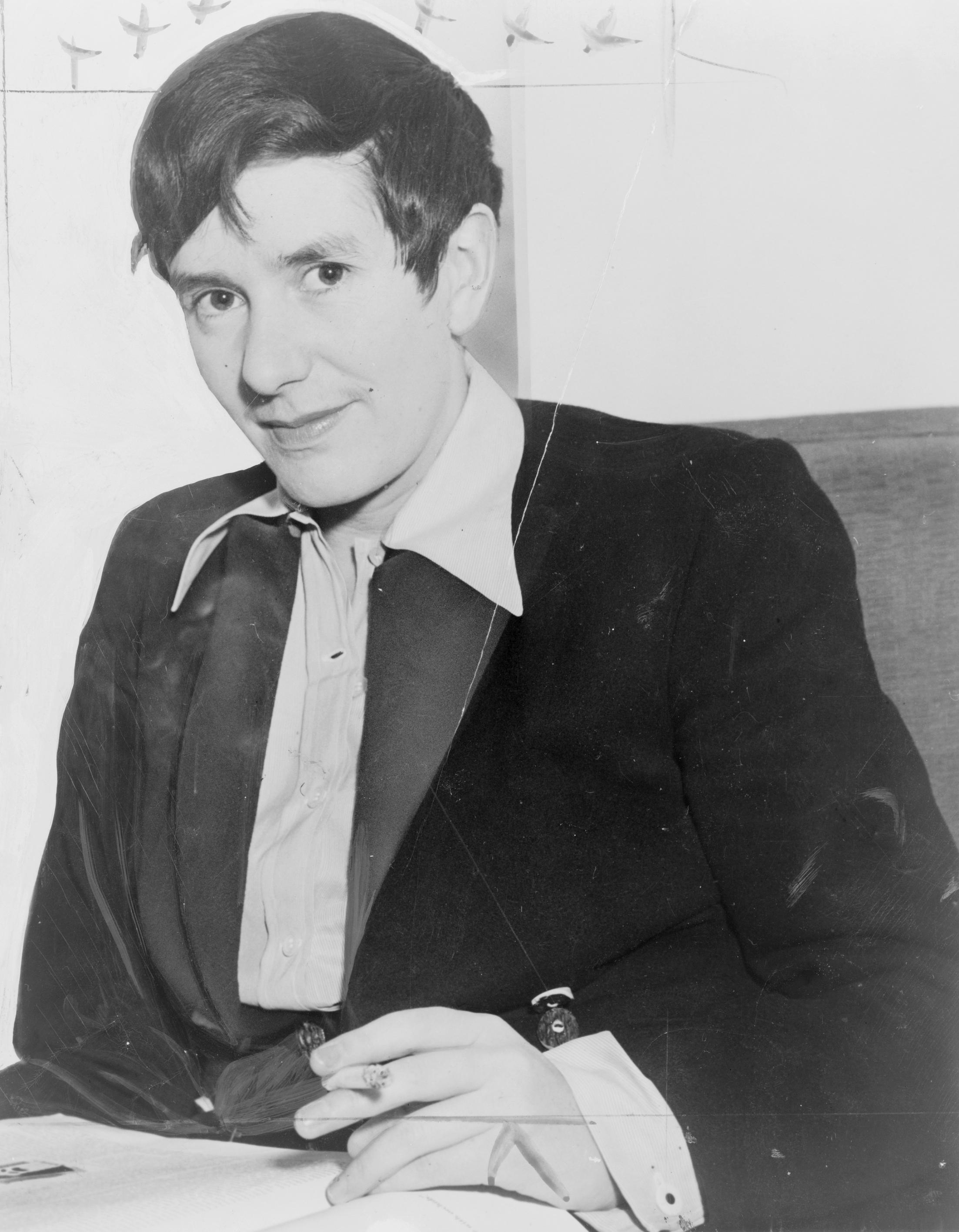 Erika Mann, German writer